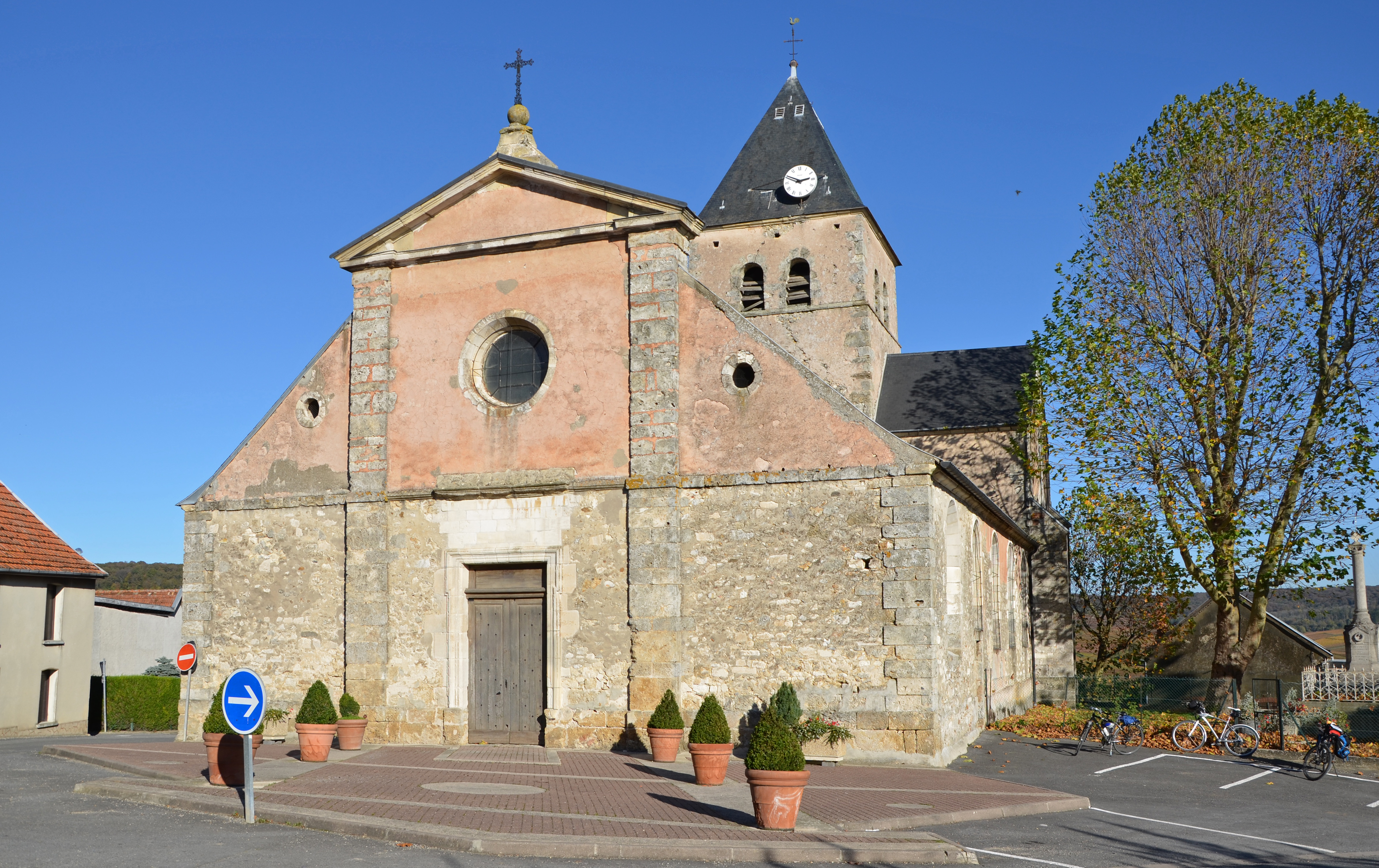 Eglise de Fleury-la-Rivière dans la montagne de Reims, Marne, Champagne-Ardennes, France